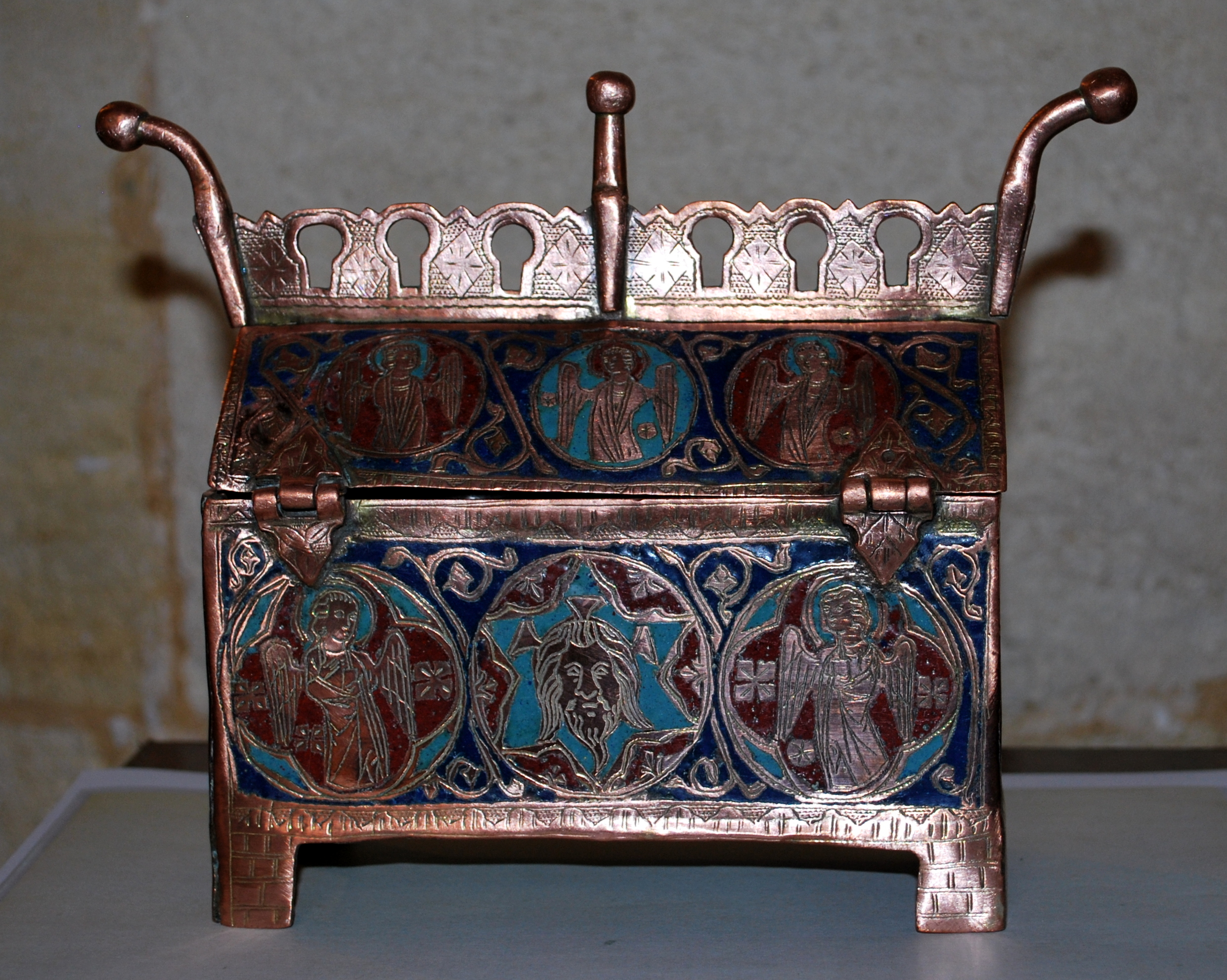 Floirac église Saint-Vincent